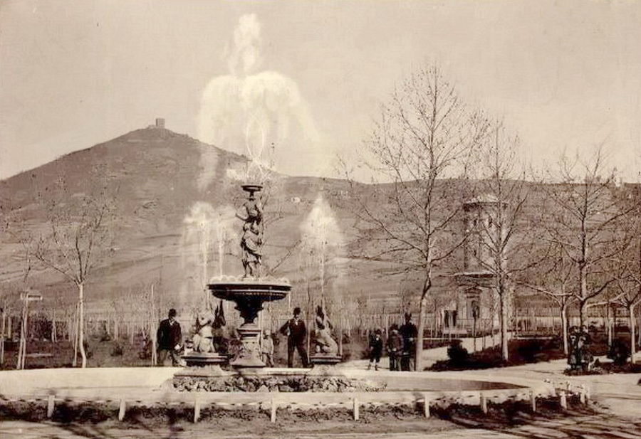 Fontana u gradskom parku krajem XIX veka.